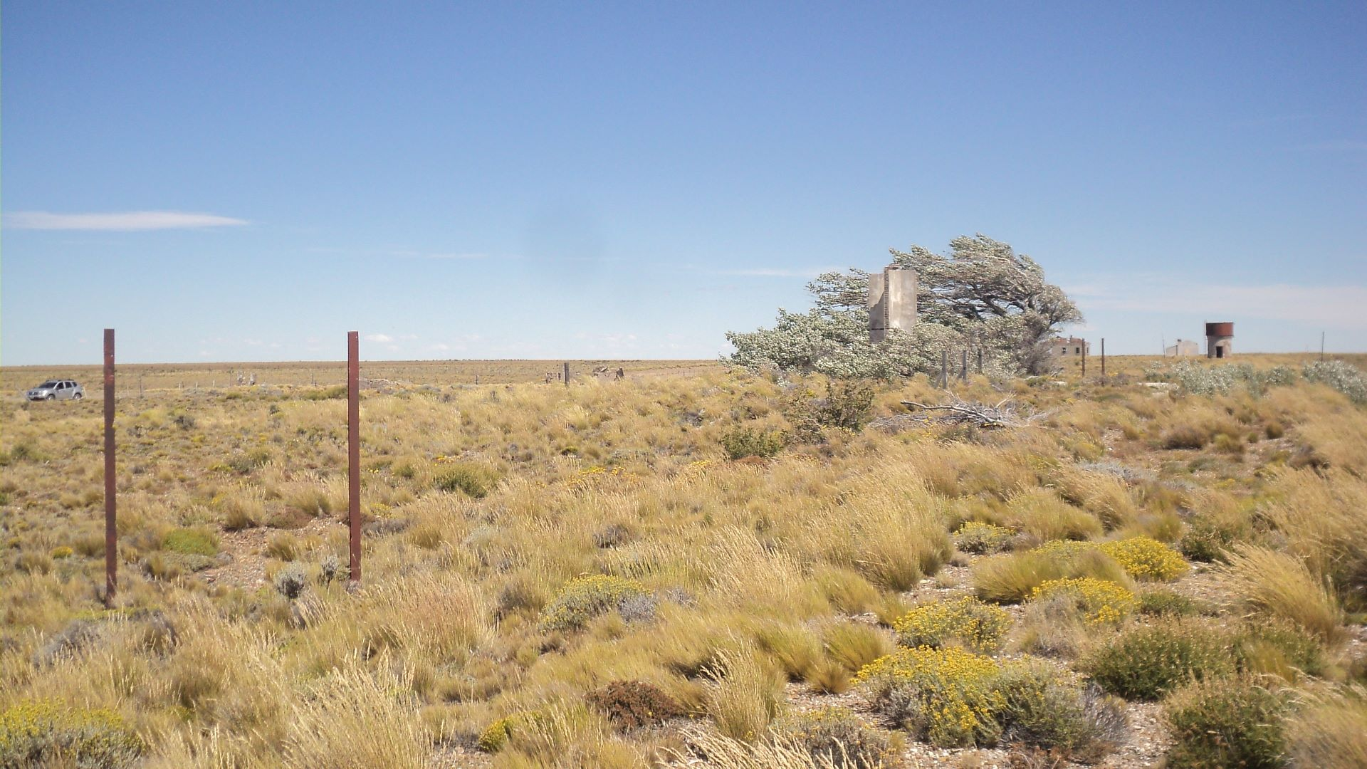 Lo que fue un cartel nomclador acompaña a los restos de la estación